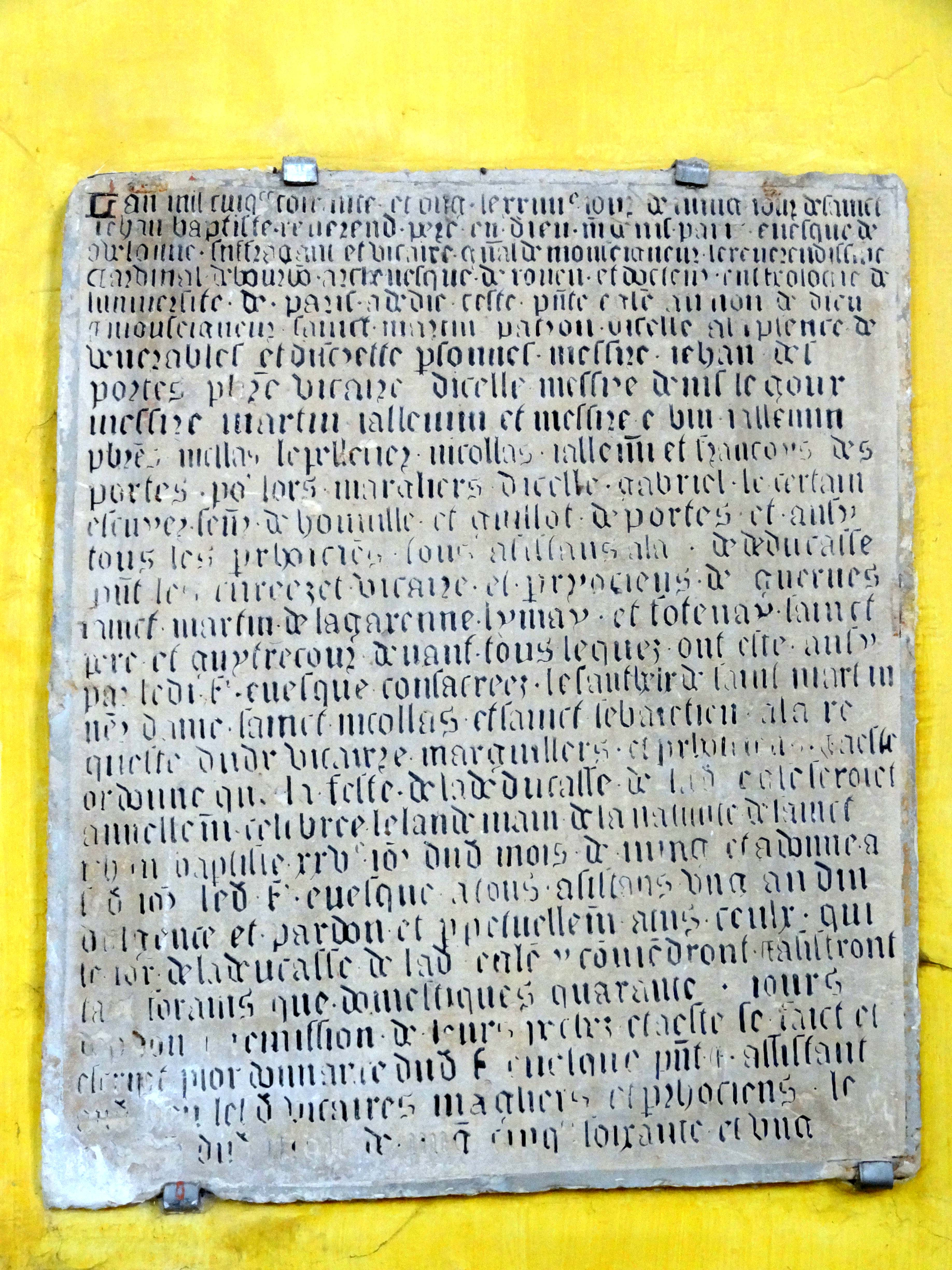 Mobilier de l'église - voir titre.